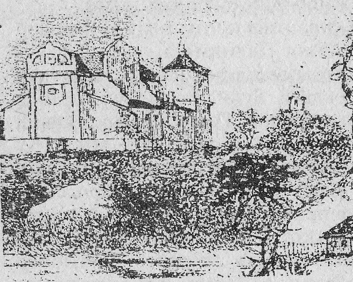 Журнал Клоси Полонне